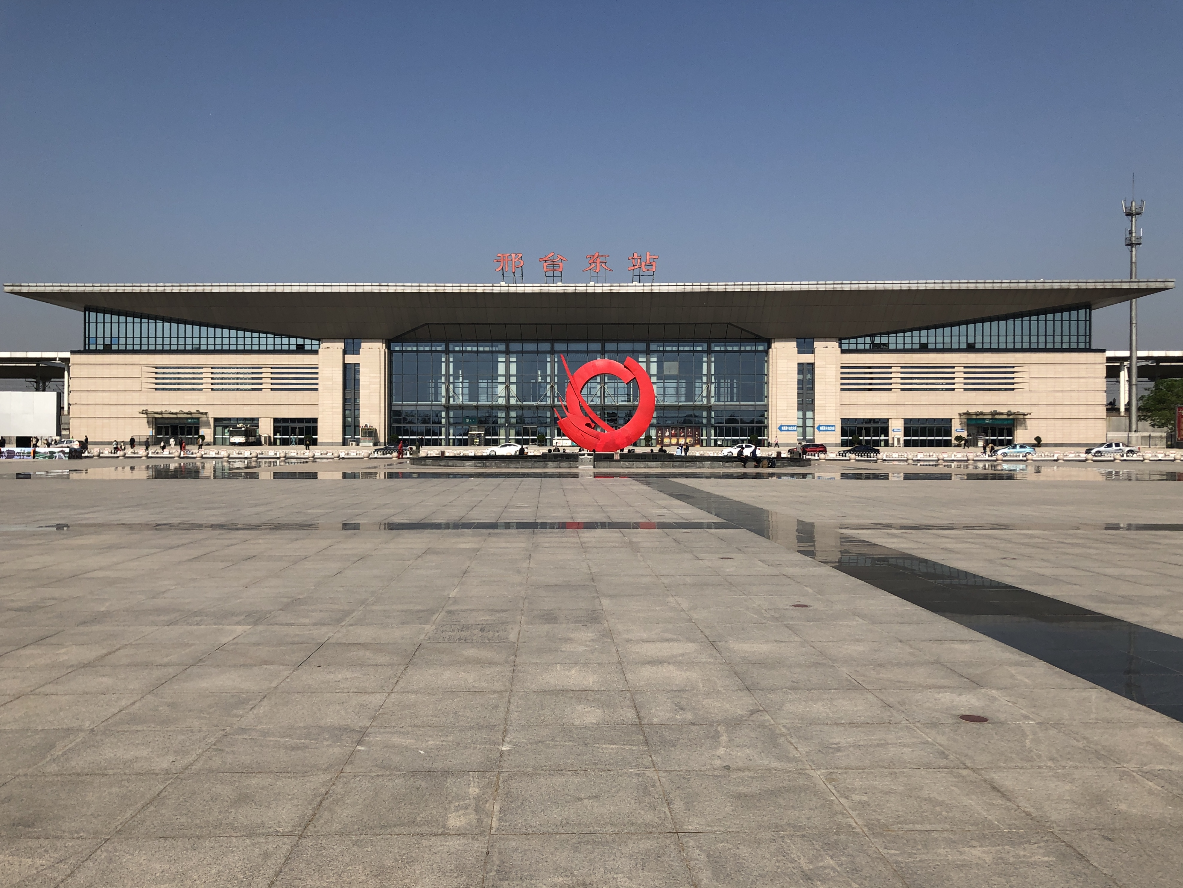 中文（中国大陆）: 2020年春季邢台东站